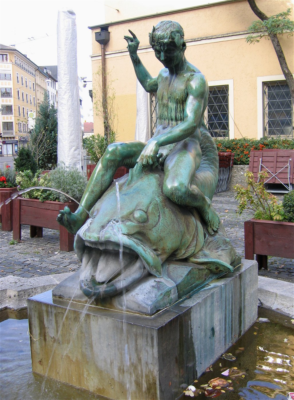 Delphinbrunnen, München